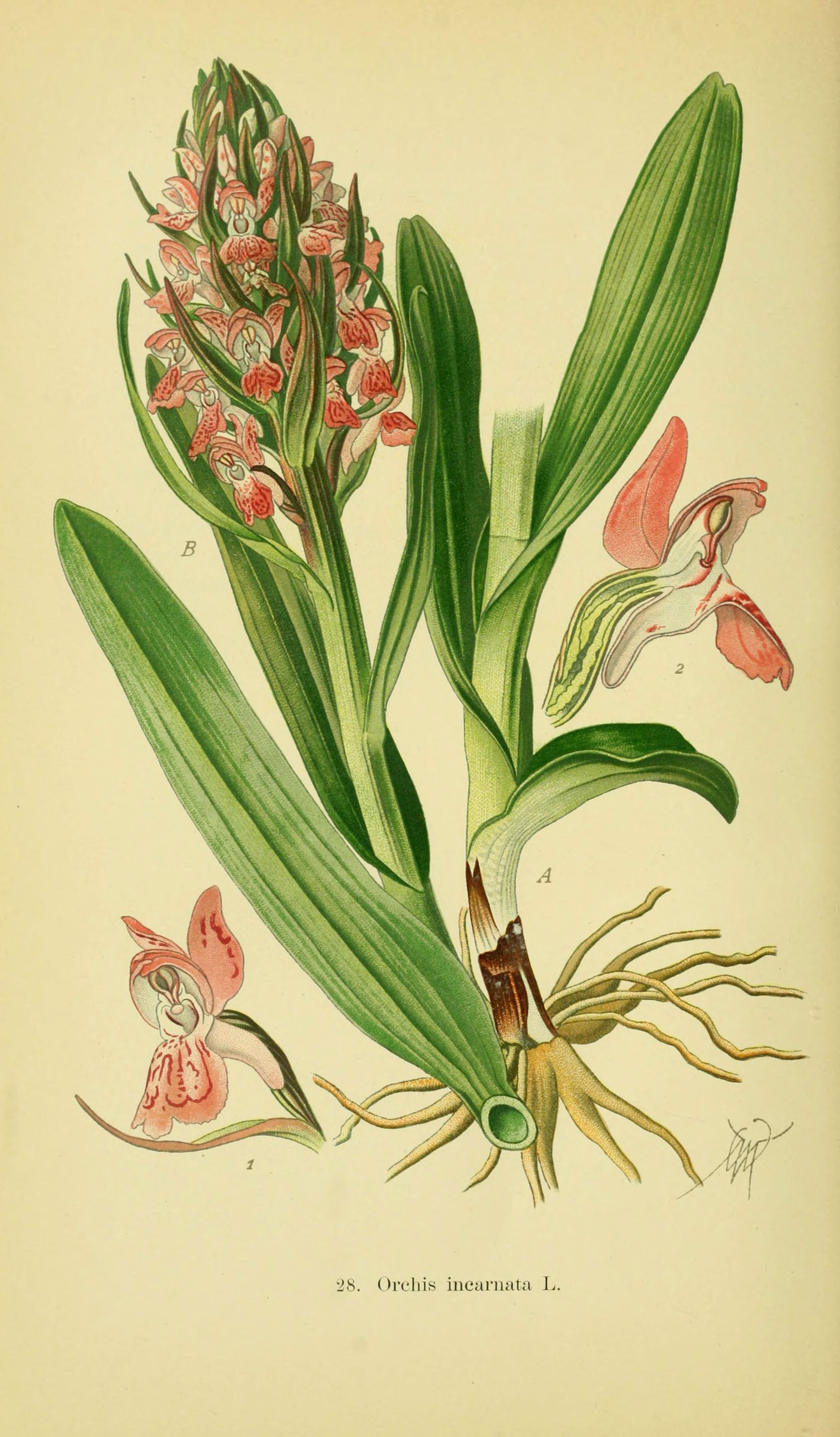 •28. Orchis incarnata L.